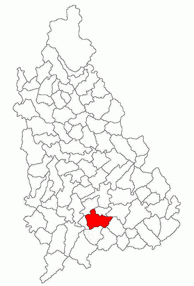 Categorie:Hărţi ale judeţului Dâmboviţa